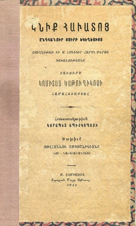 Обложка издания сборника "Корень веры"